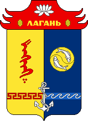 Герб города Лагань